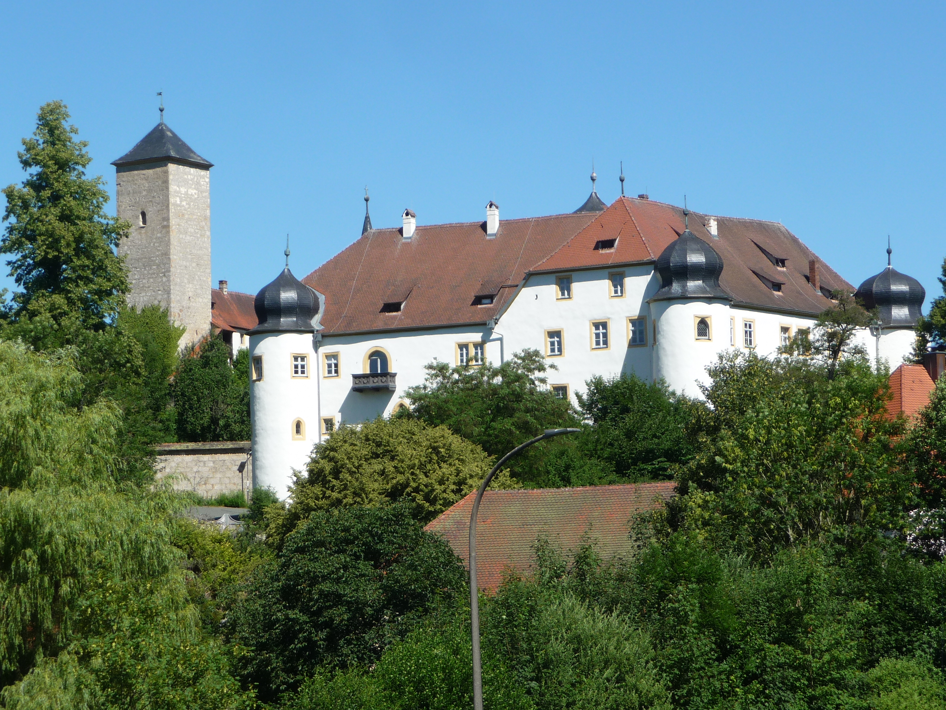 Das Schloss Unteraufseß (Burg Aufseß) ist ein Schloss in Aufseß im oberfränkischen Landkreis Bayreuth. Die Anlage gehört zu den ältesten in Oberfranken und geht wahrscheinlich auf das 11. Jahrhundert zurück. Die Burg Aufseß auf einem Hügel im Ort ist der Stammsitz der Familie von Aufseß und befindet sich noch im Familienbesitz.